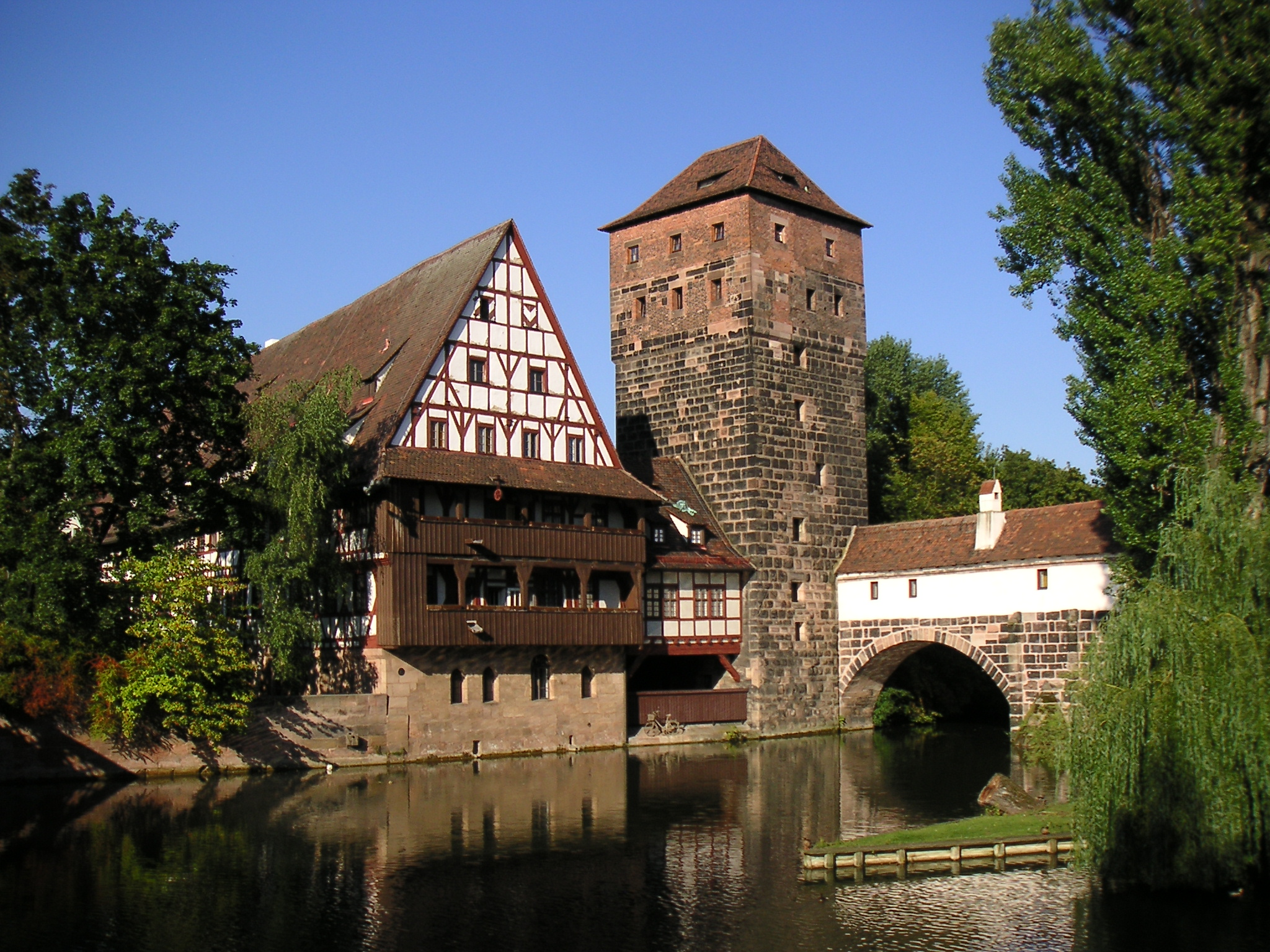 Weinstadel in Nürnberg-St. Sebald